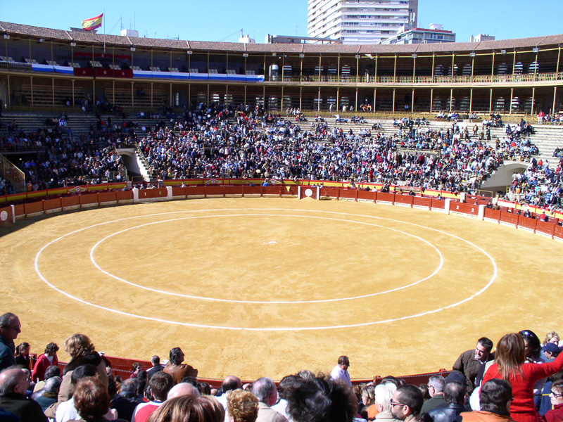 Stierkampfarena in Alicante